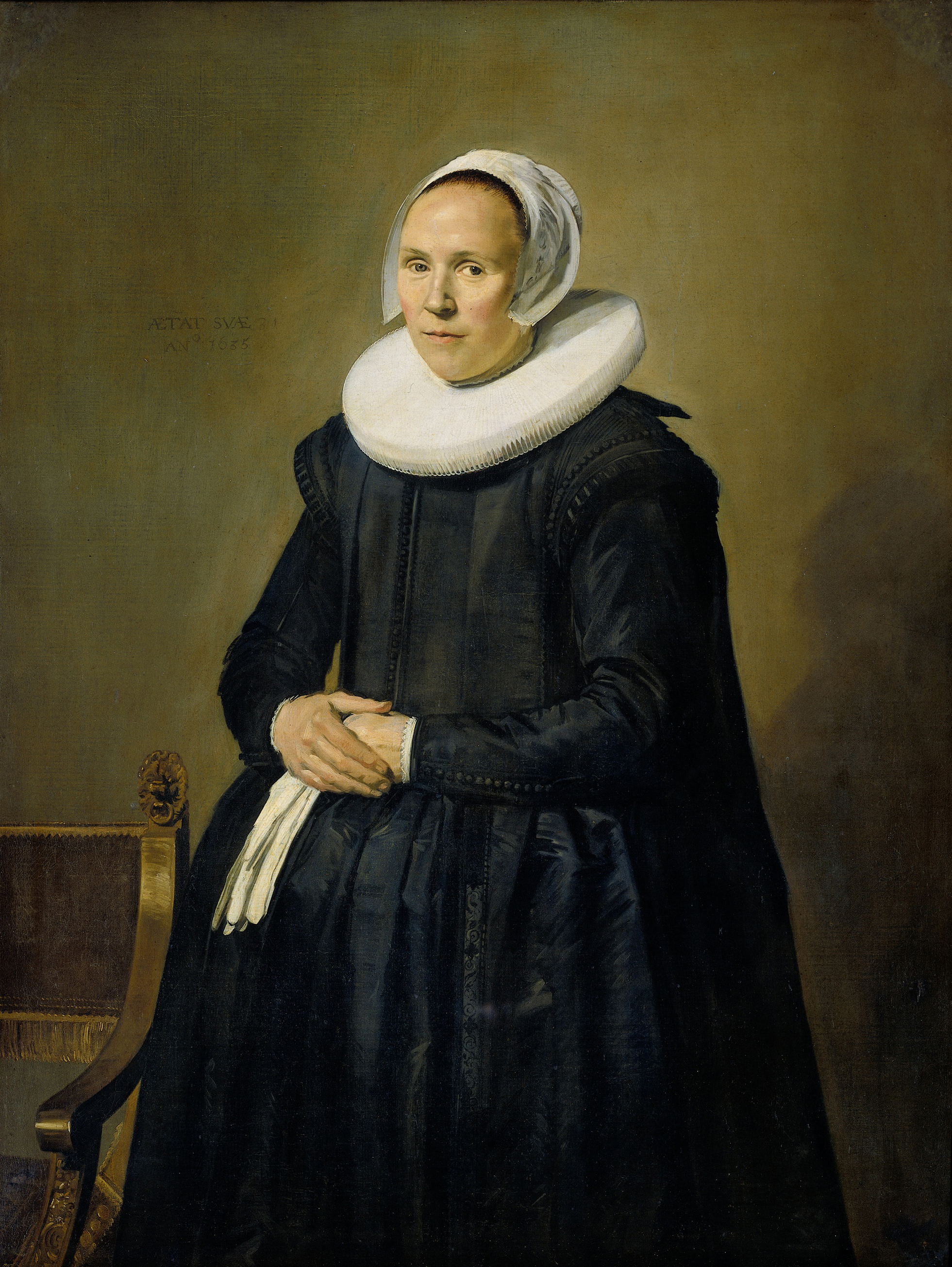 Portrait of Feyntje van Steenkiste. Pendant of File:Frans Hals 034.jpg.